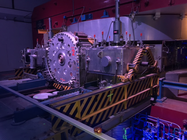 בתמונה הסינכרו-ציקלוטורון במרכז לחקר פיזיקת חלקיקים CERN. המאיץ אינו פעיל כיום והוא מוצג בתערוכה בה מסופר הסיפור הפיזיקלי, ההיסטורי והאנשים מאחורי המחקר.